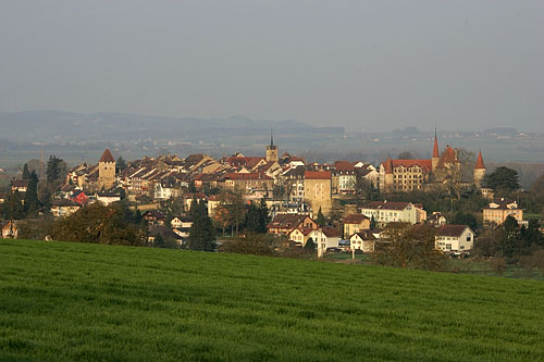 Avenches (Tour de Benneville / Eglise / Amphitheater / Château)